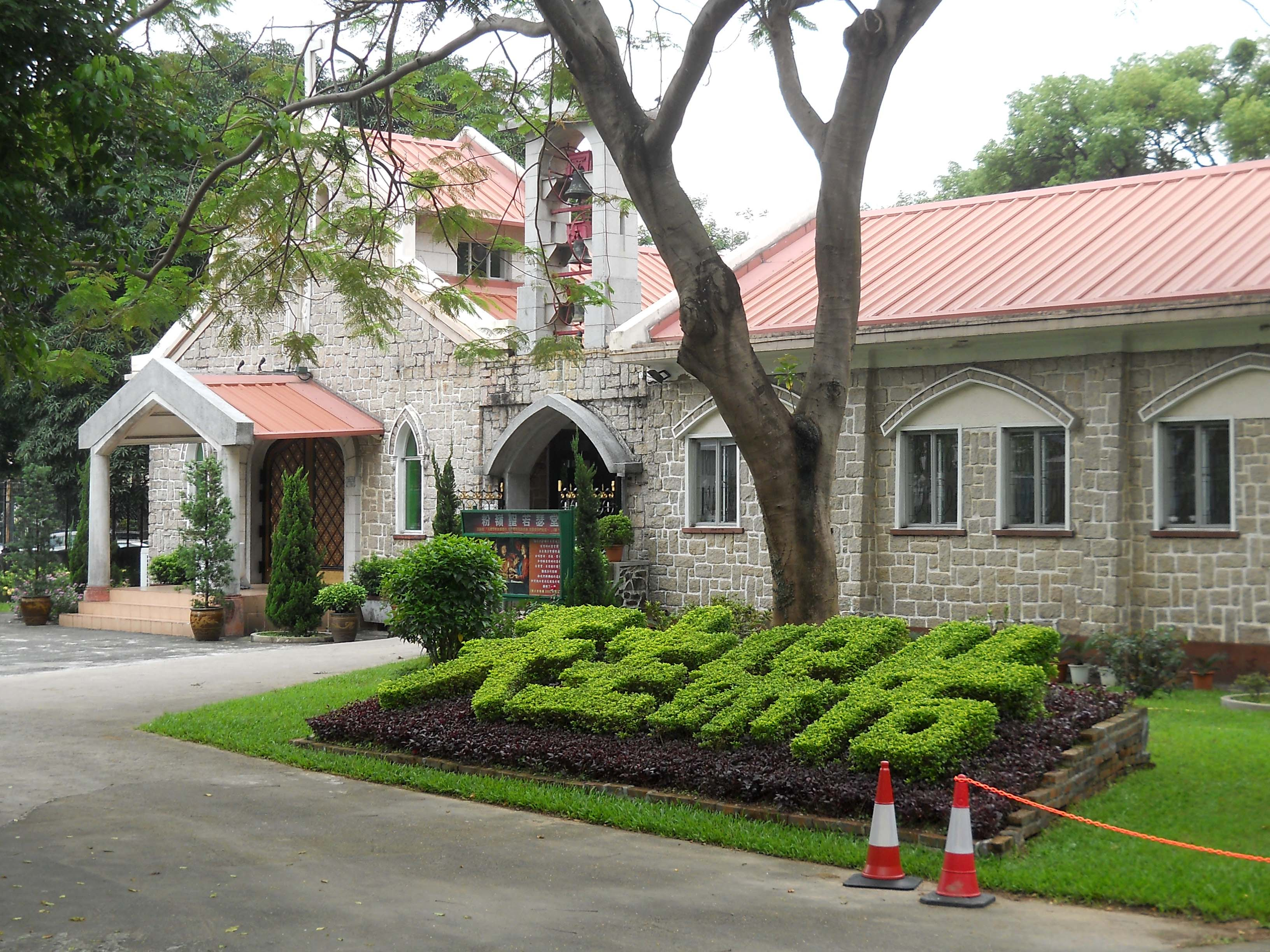 中文（香港）: 聖約瑟堂教堂及活動室